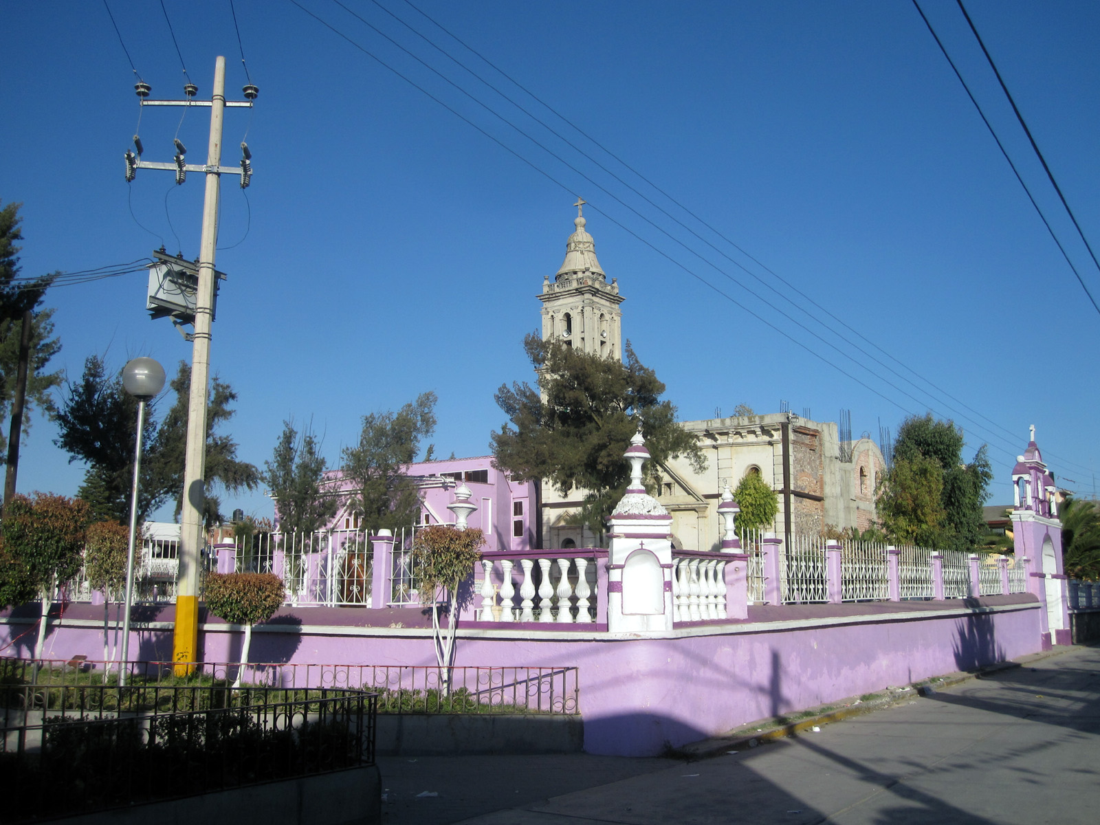 Templo de San Francisco de Asís i Acuexcomac i Atenco kommune i Mexico